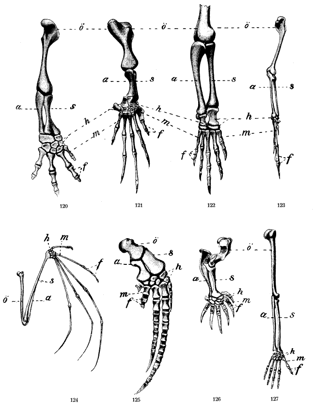 Comparative study of the skeleton of the arm. Original caption Främre lemmens skelett fig. 120 af salamander, fig. 121 af hafssköldpadda, fig. 122. af krokodil, fig. 123 af fågel, fig. 124 af flädermus, fig, 125 af hval, fig. 126 af mullvad, fig. 127 af människa, ö öfverarmben, s strålben, a armbågsben, h handrotsben, m mellanhandsben, f fingerben. Deutsch 120 Salamander, 121 Schildkröte, 122 Krokodil, 123 Vogel, 124 Fledermaus, 125 Wal, 126 Maulwurf, 127 Mensch